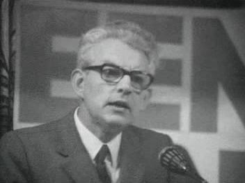 Marcus Bakker tijdens de verkiezingscampagne in 1972